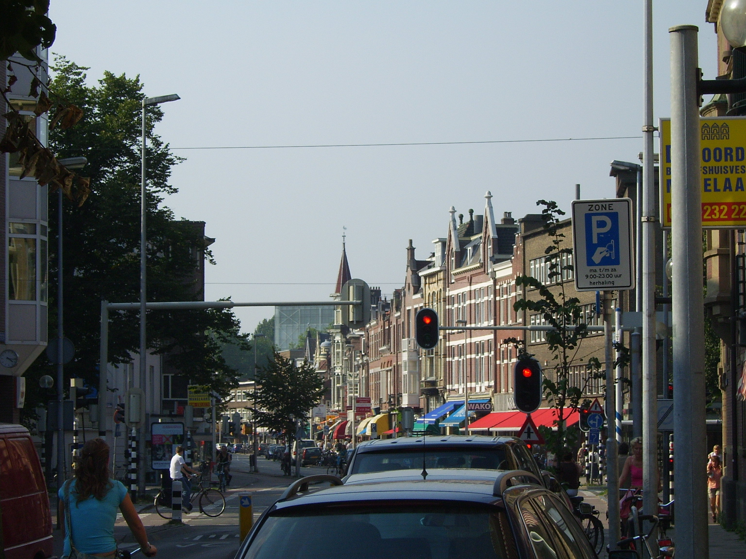 eigen werk Ruben Alexander